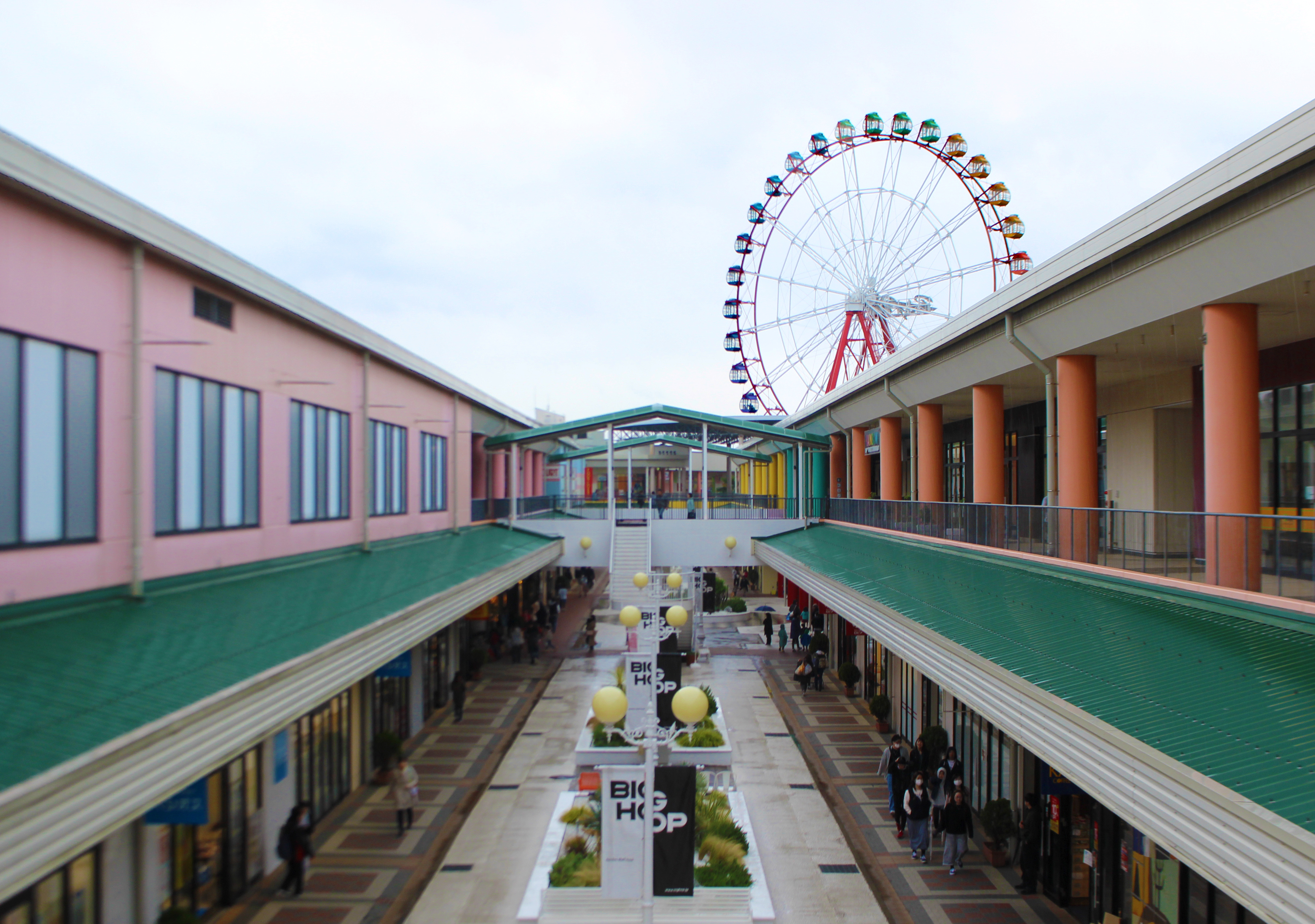 ビッグホップガーデンモール印西のモール内と観覧車